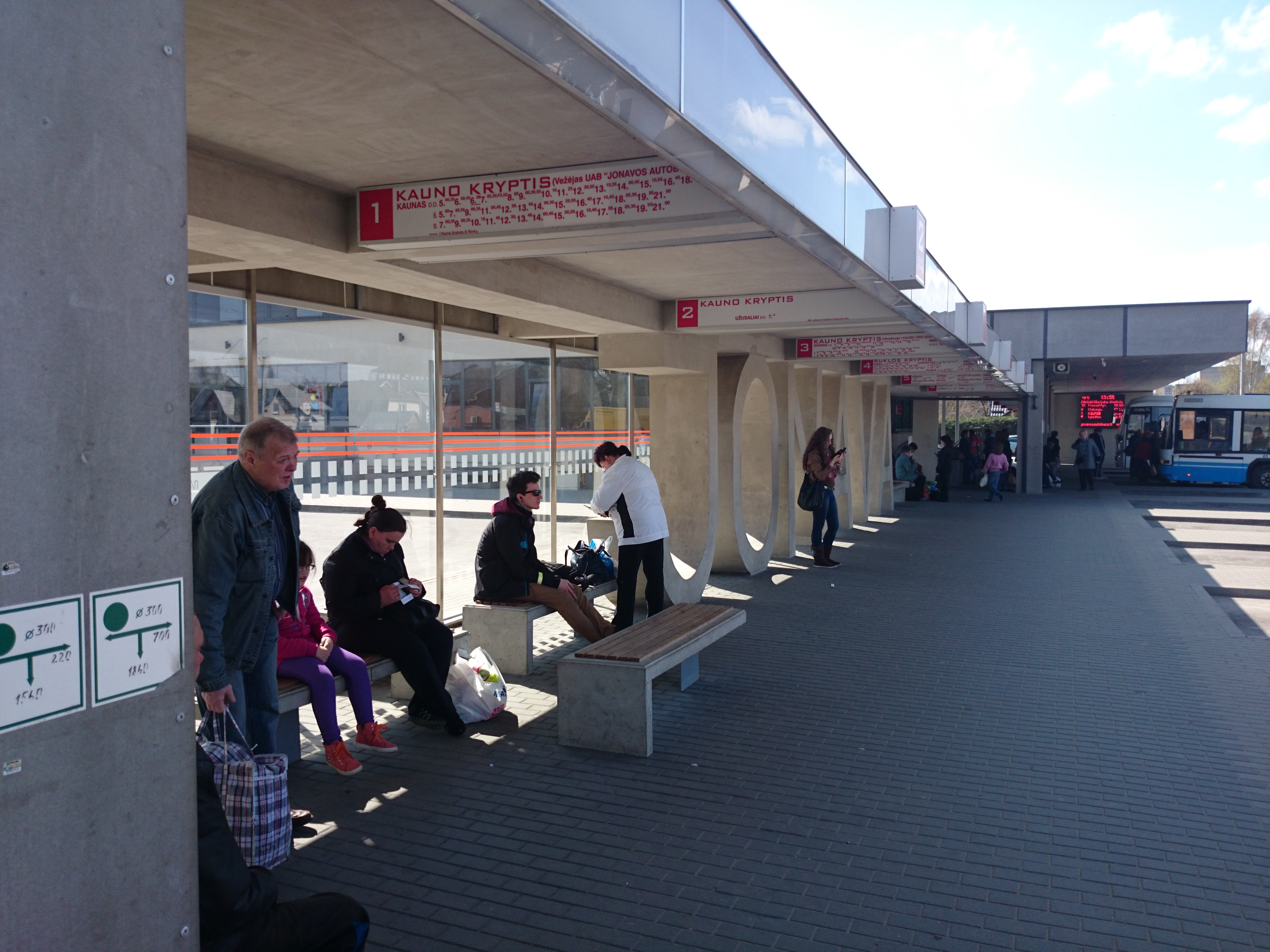 Jonava bus station